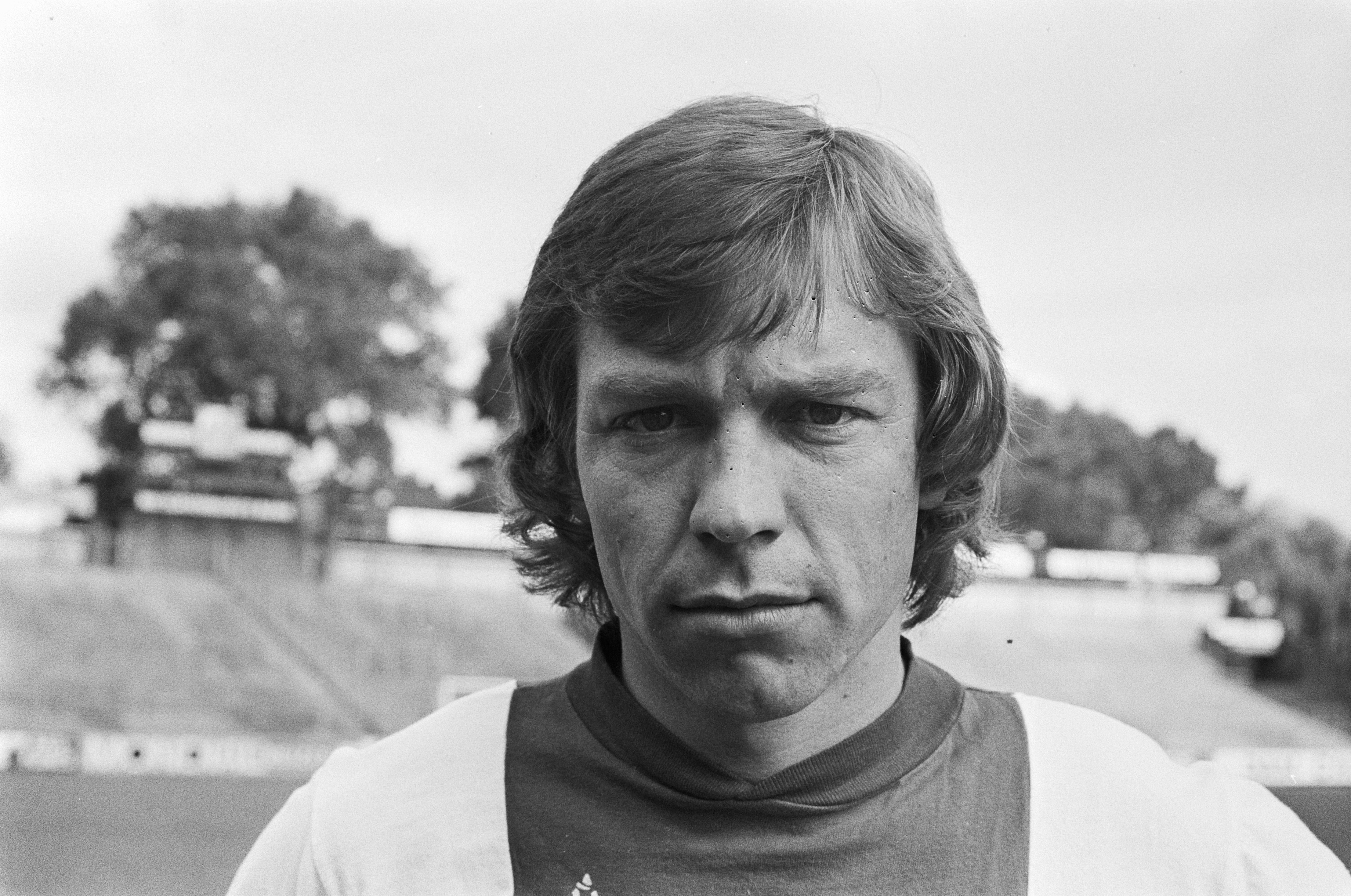 Collectie / Archief : Fotocollectie Anefo Reportage / Serie : [ onbekend ] Beschrijving : Ajax presenteert A-selectie voor komend seizoen; Jan Mulder Annotatie : neg.nr. 20 Datum : 6 augustus 1974 Locatie : Amsterdam Trefwoorden : portretten, voetbal, voetballers Persoonsnaam : Mulder, Jan Fotograaf : Peters, Hans / Anefo Auteursrechthebbende : Nationaal Archief Materiaalsoort : Negatief (zwart/wit) Nummer archiefinventaris : bekijk toegang 2.24.01.05 Bestanddeelnummer : 927-3733